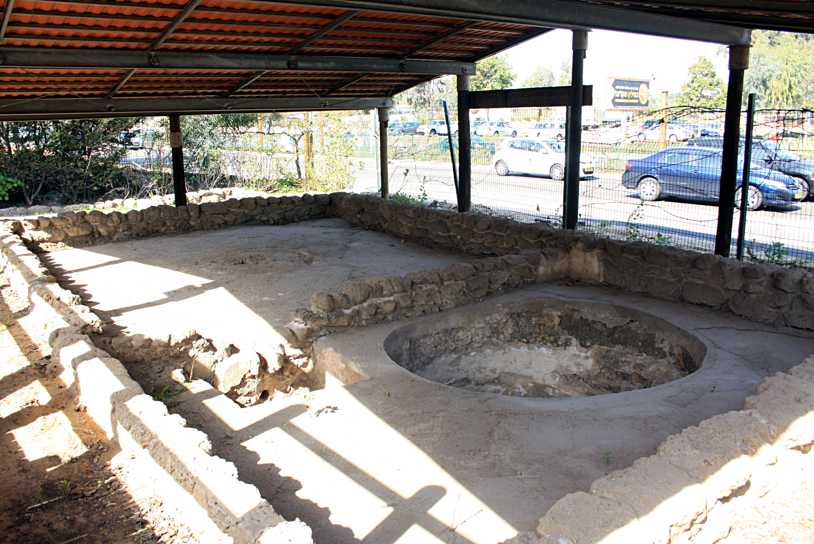 גת מהתקופה הביזנטית בגן הגתות, ראשון לציון.